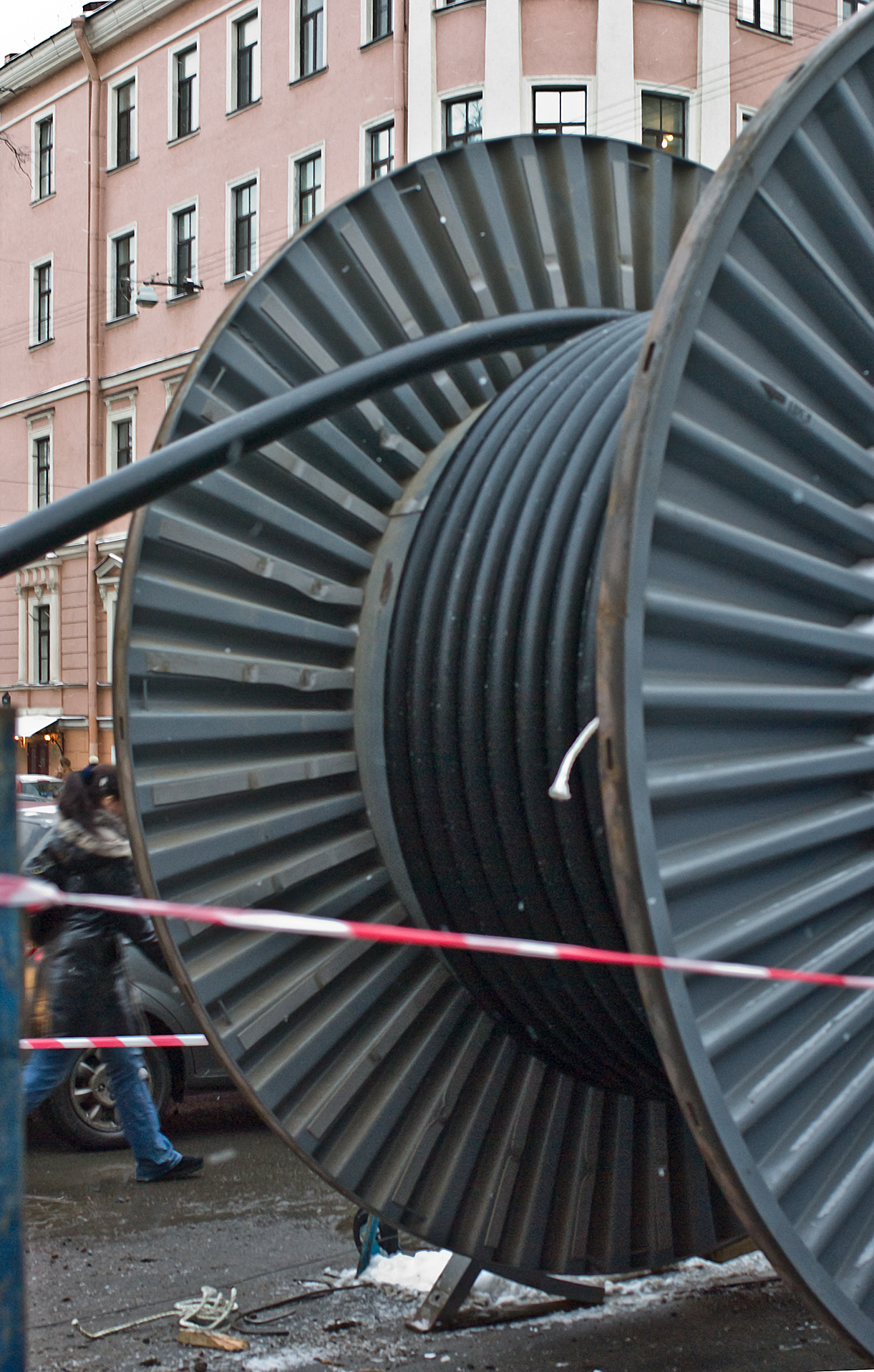 Катушка для силового кабеля для подземной прокладки